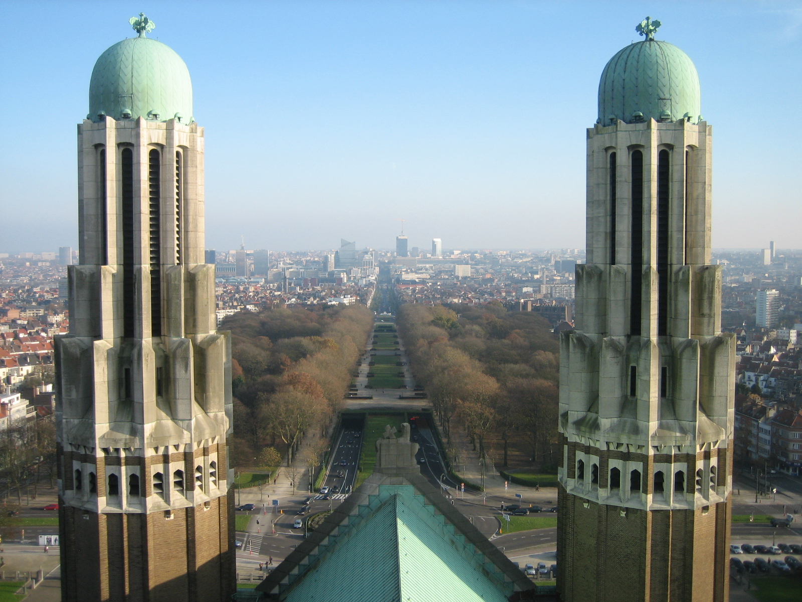 Tours de la Basilique de Koekelberg et Boulevard Léopold II.